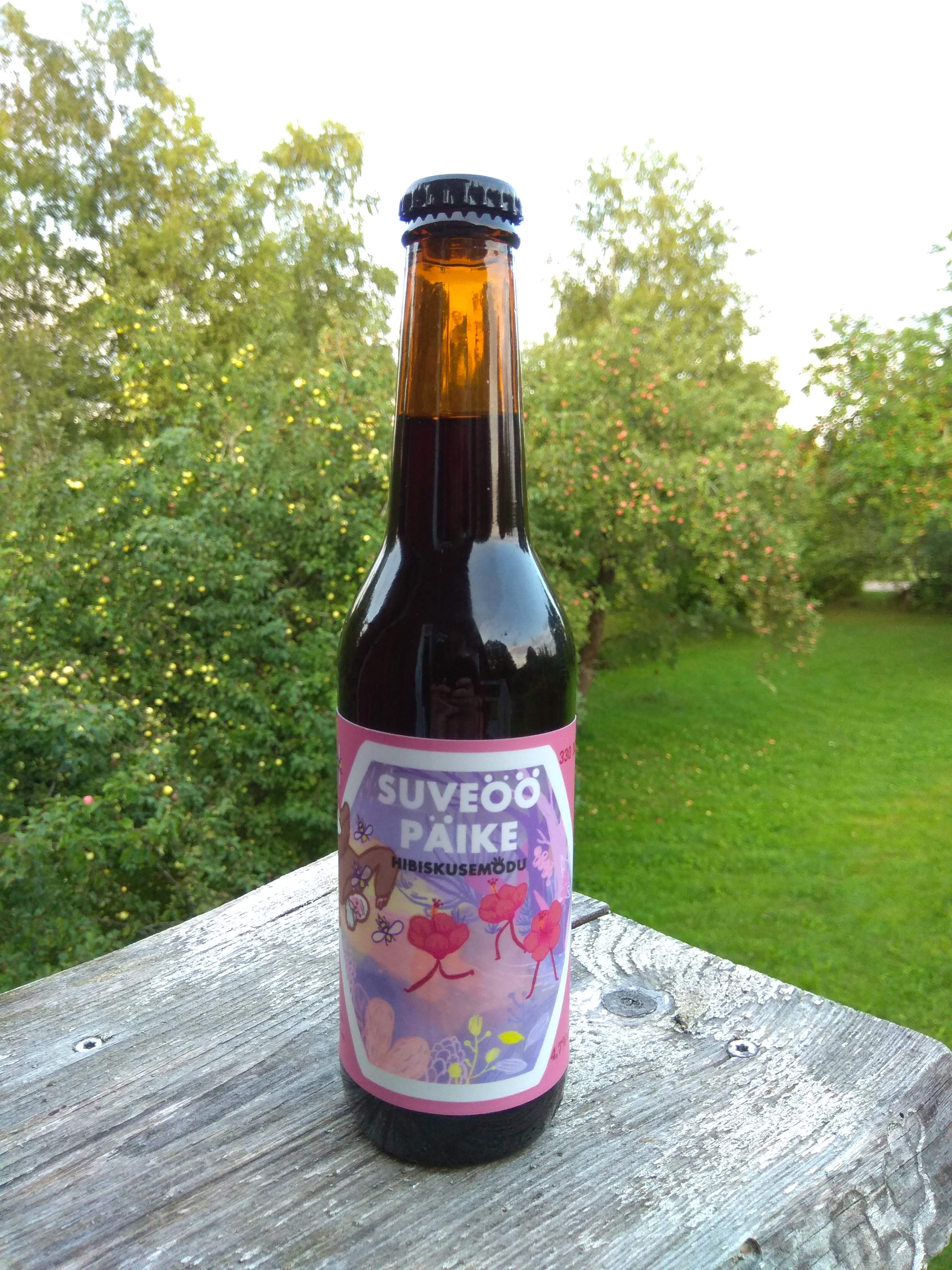 Tegemist on Eesti käsitöömõduga, mis on valmistatud hibiskusega ning liigitub seega melomeli kategooriasse.